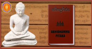 ភាសាខ្មែរ: Ab